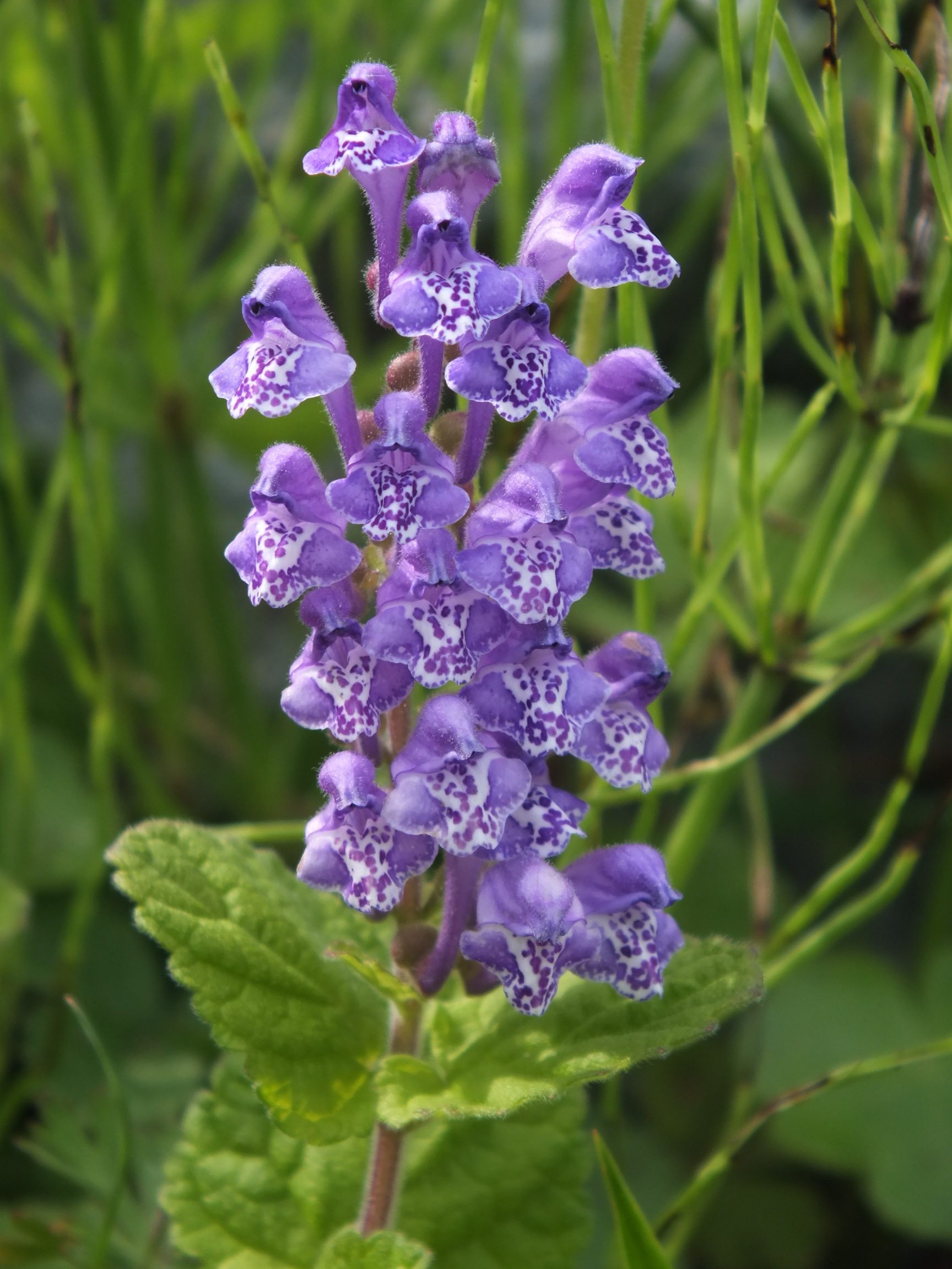 Scutellaria タツナミソウ やしろの森公園